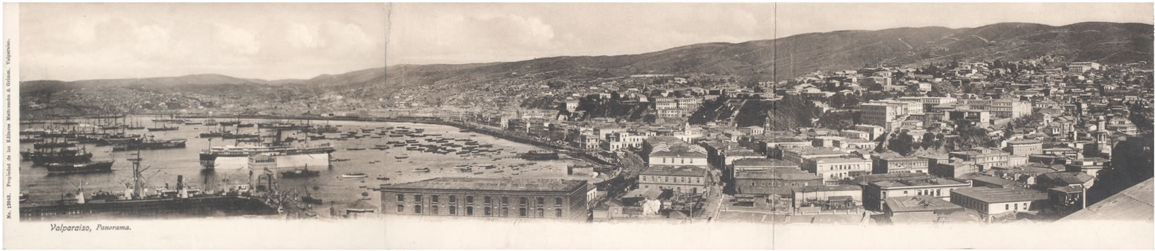 Panorámica de Valparaíso